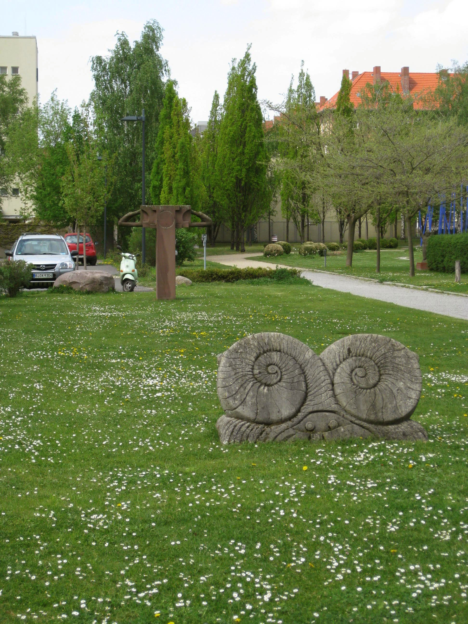 Günter Anlauf, Thüster Nautiliden, 1979-80, (im Hintergrund: Rudi Pabel, Rotation, 1979) - Skulpturengarten AVK, Rubensstr. 125, Berlin (Schöneberg), Deutschland